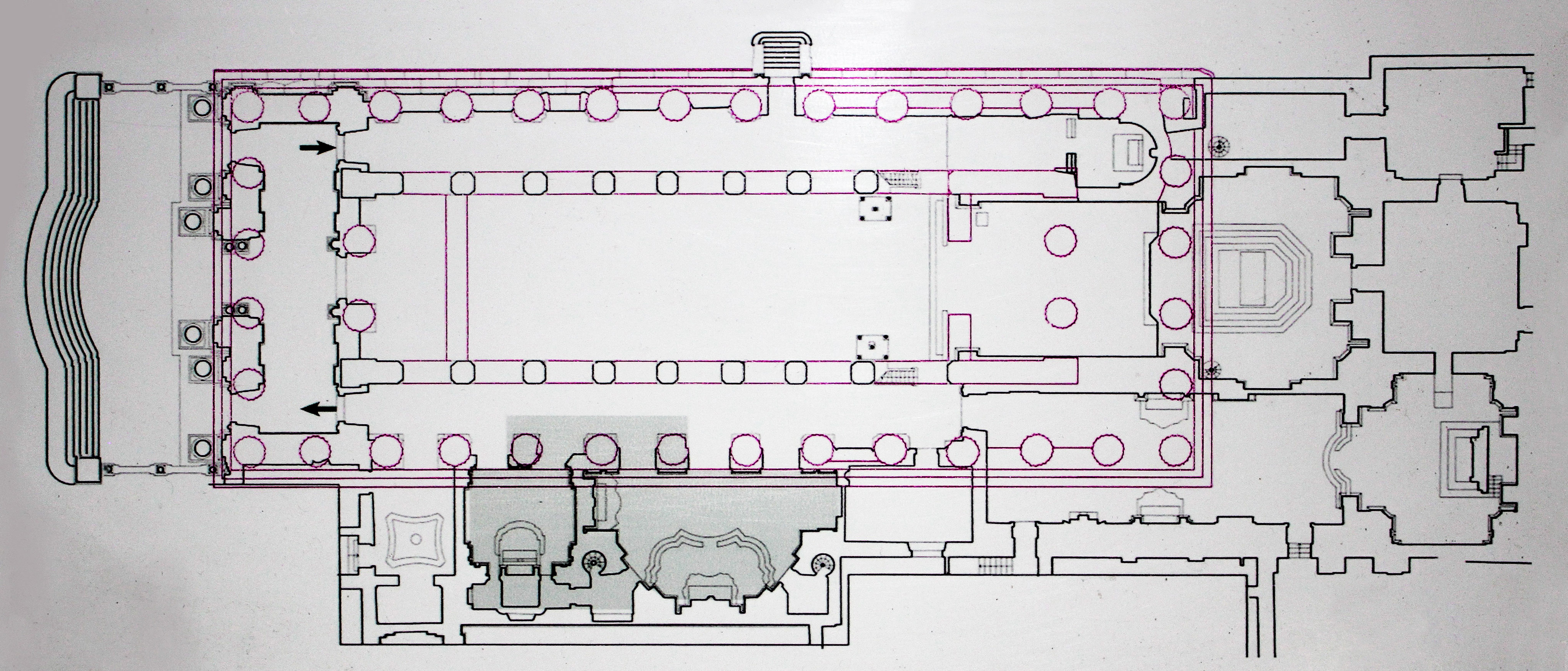 Grundriss des Domes von Syrakus